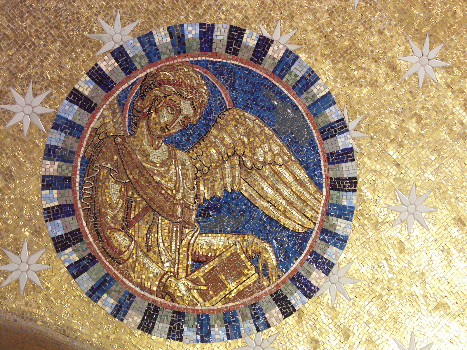 Mont Sainte-Odile, Alsace, France